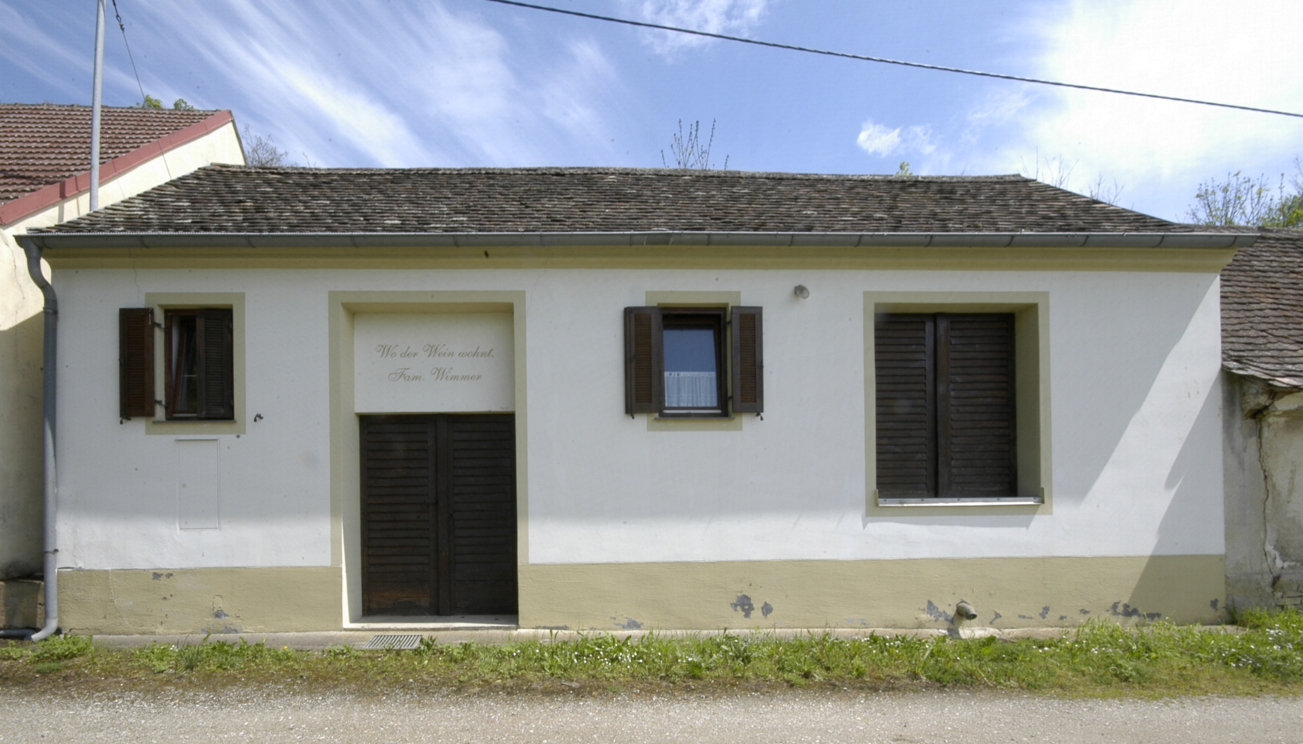 Objekt in der Mühlkellergasse in Frauendorf an der Schmida